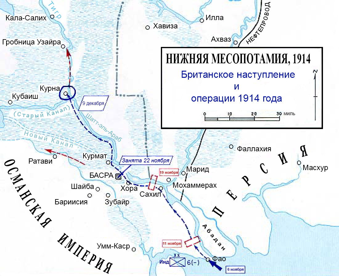 Карта вторжения британской армии в Месопотамию во время Первой мировой войны.